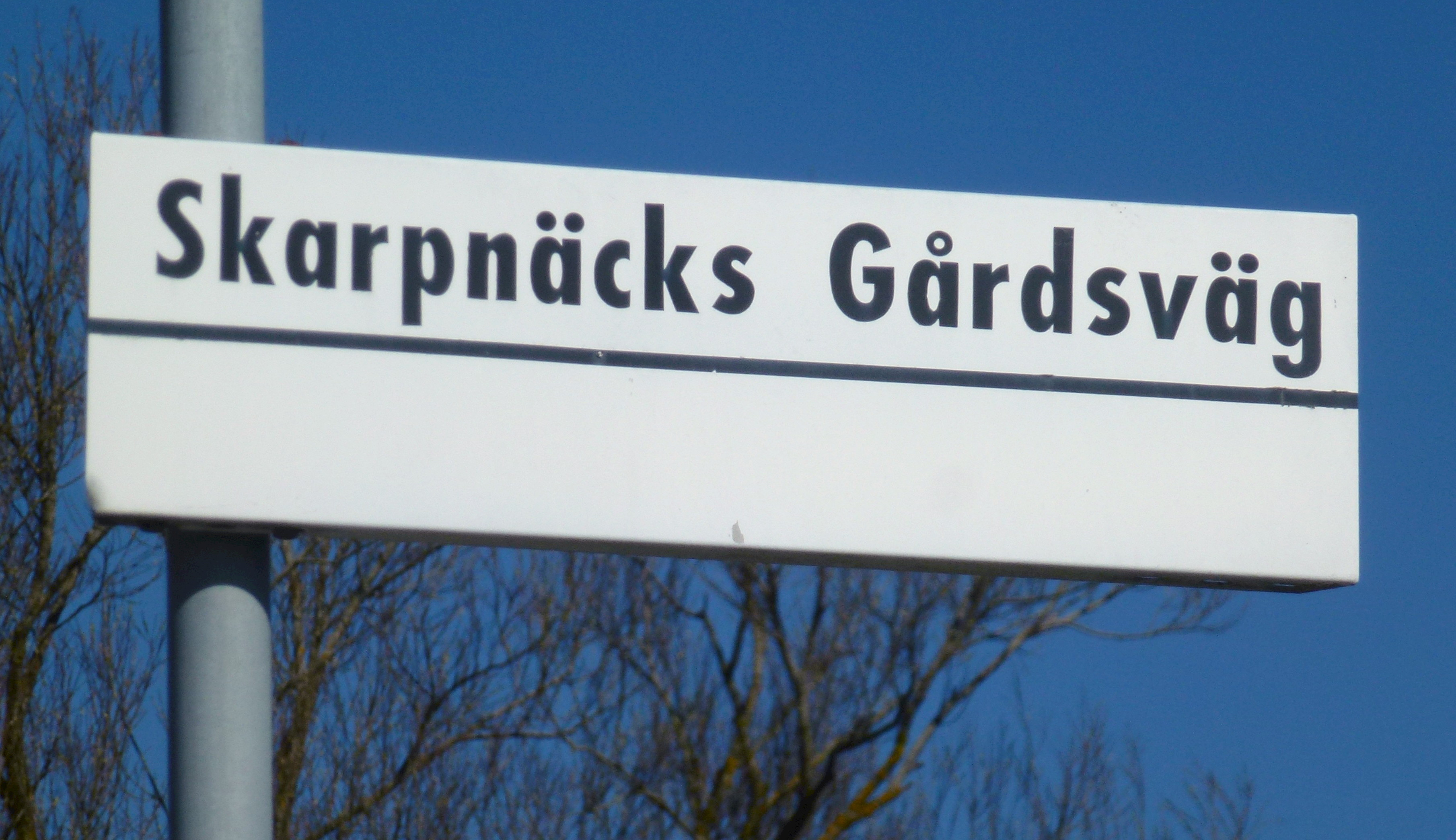 Gatuskylt "Skarpnäcks Gårdsväg"